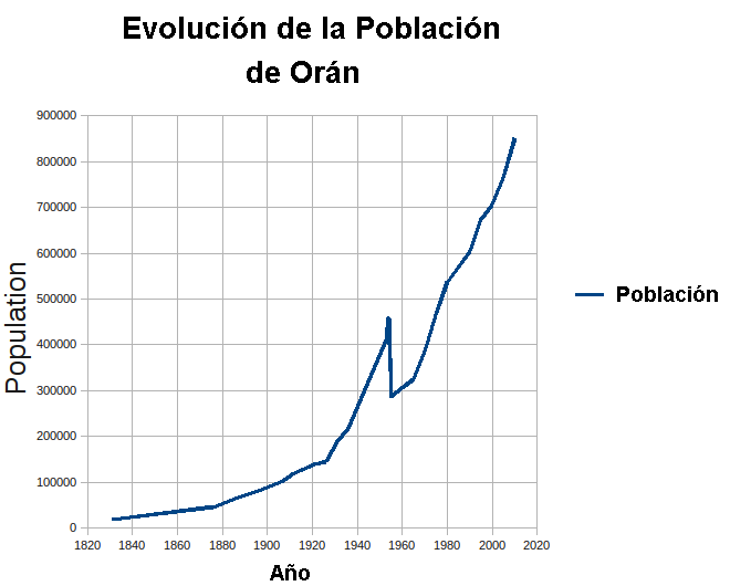 Evolucion de la Poblacion